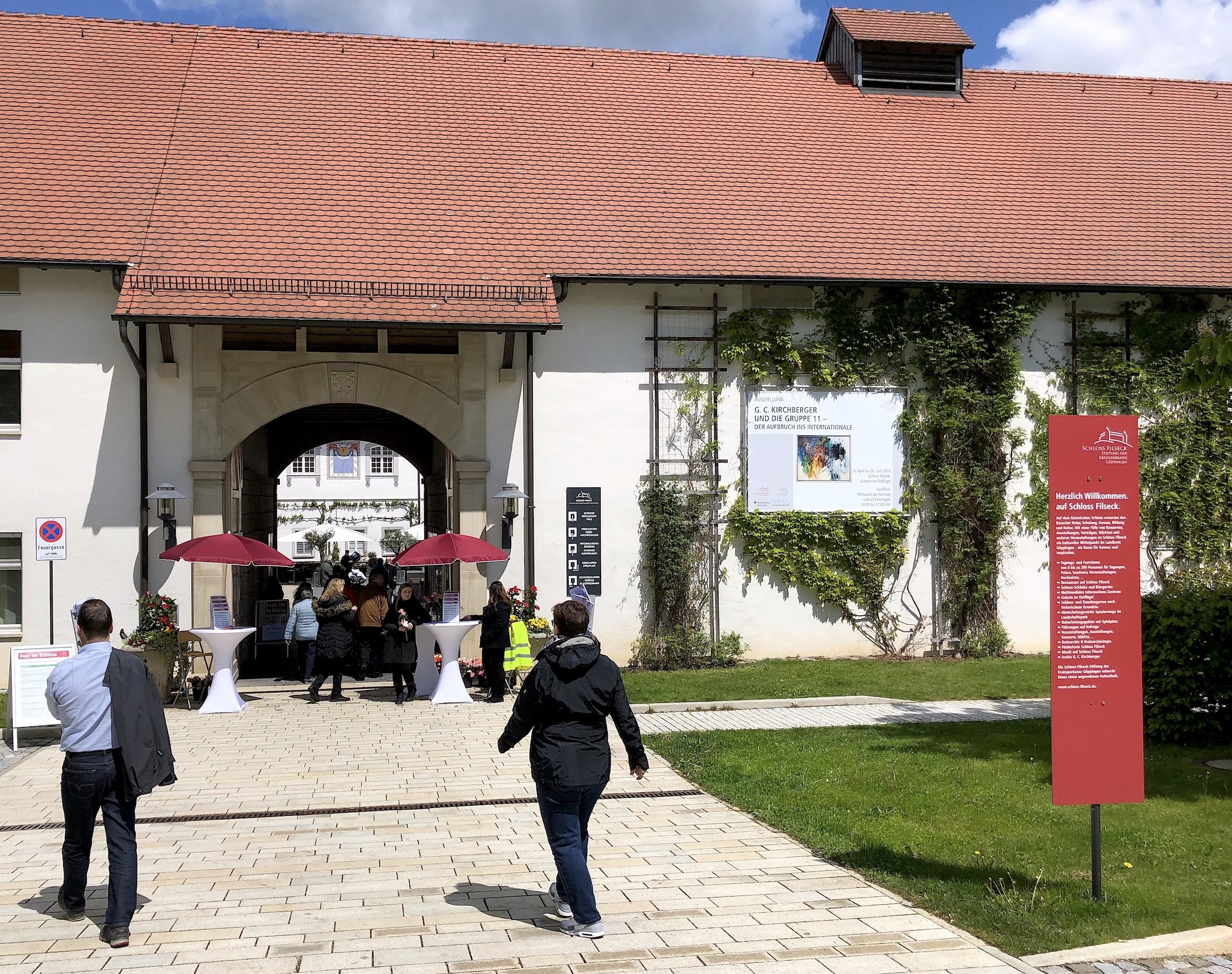 Schloss Filseck, Eingangstor mit Besuchern und Hinweistafel (aufgenommen anlässlich des Schloss-Festes 2019)